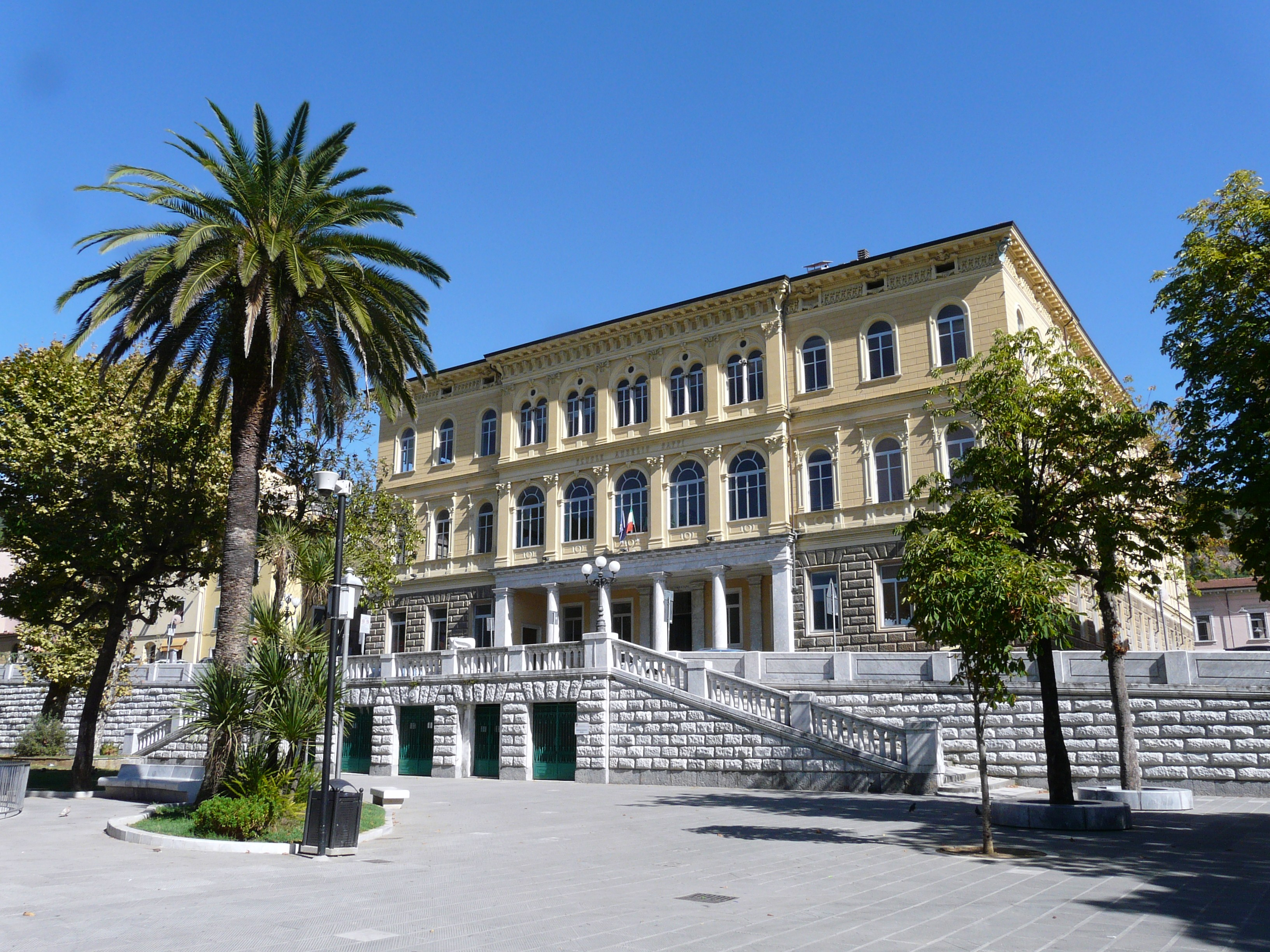 Piazza Gramsci, Carrara, Toscana, Italia